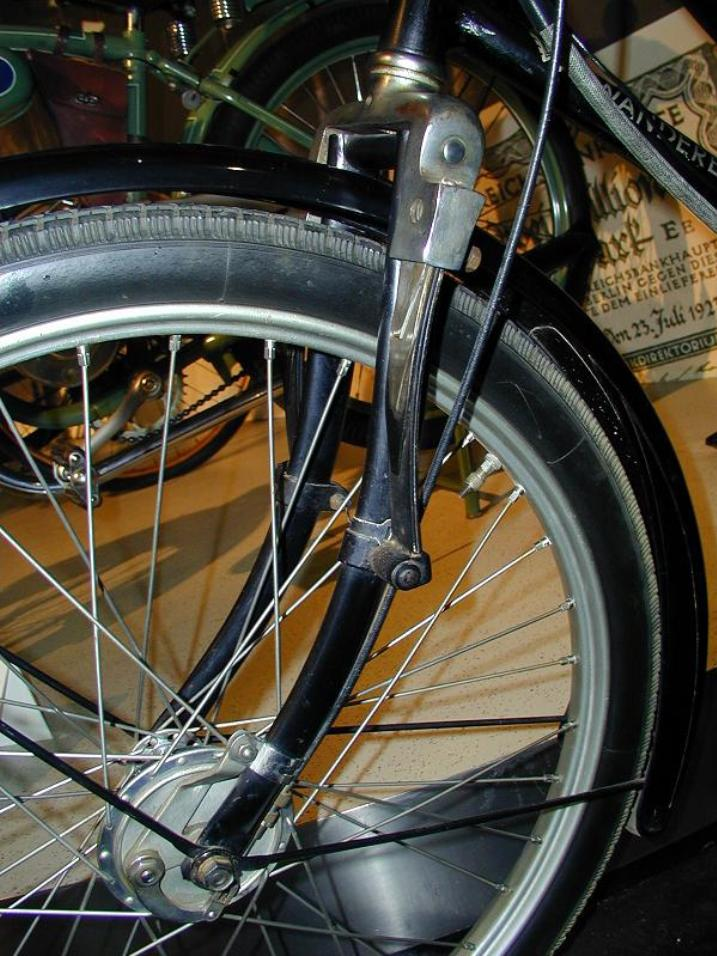 Federgabel, Neckarsulmer Motorenwerke, 1905